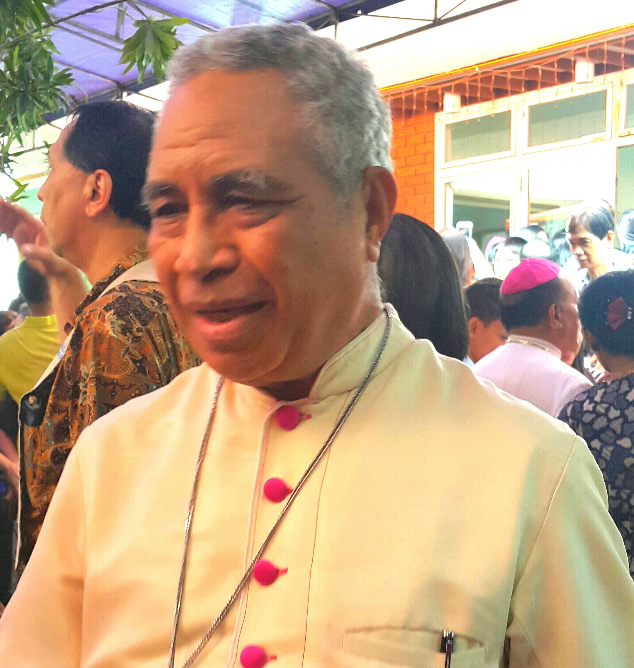 Mgr Leo Laba Ladjar, Uskup Jayapura